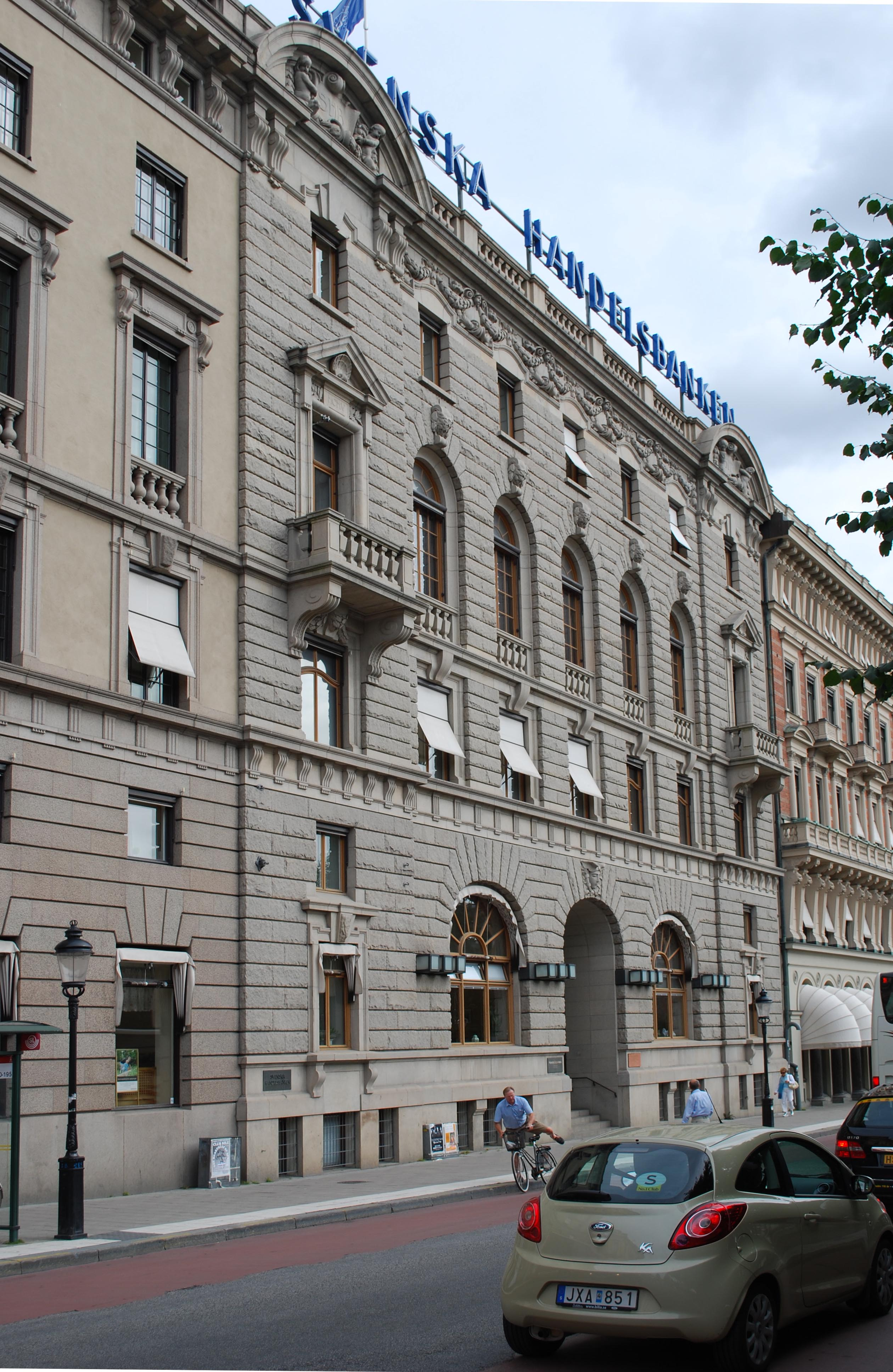 Kungsträdgårdsgatan 4, Stockholm. Svenska handelsbankens huvudkontor.